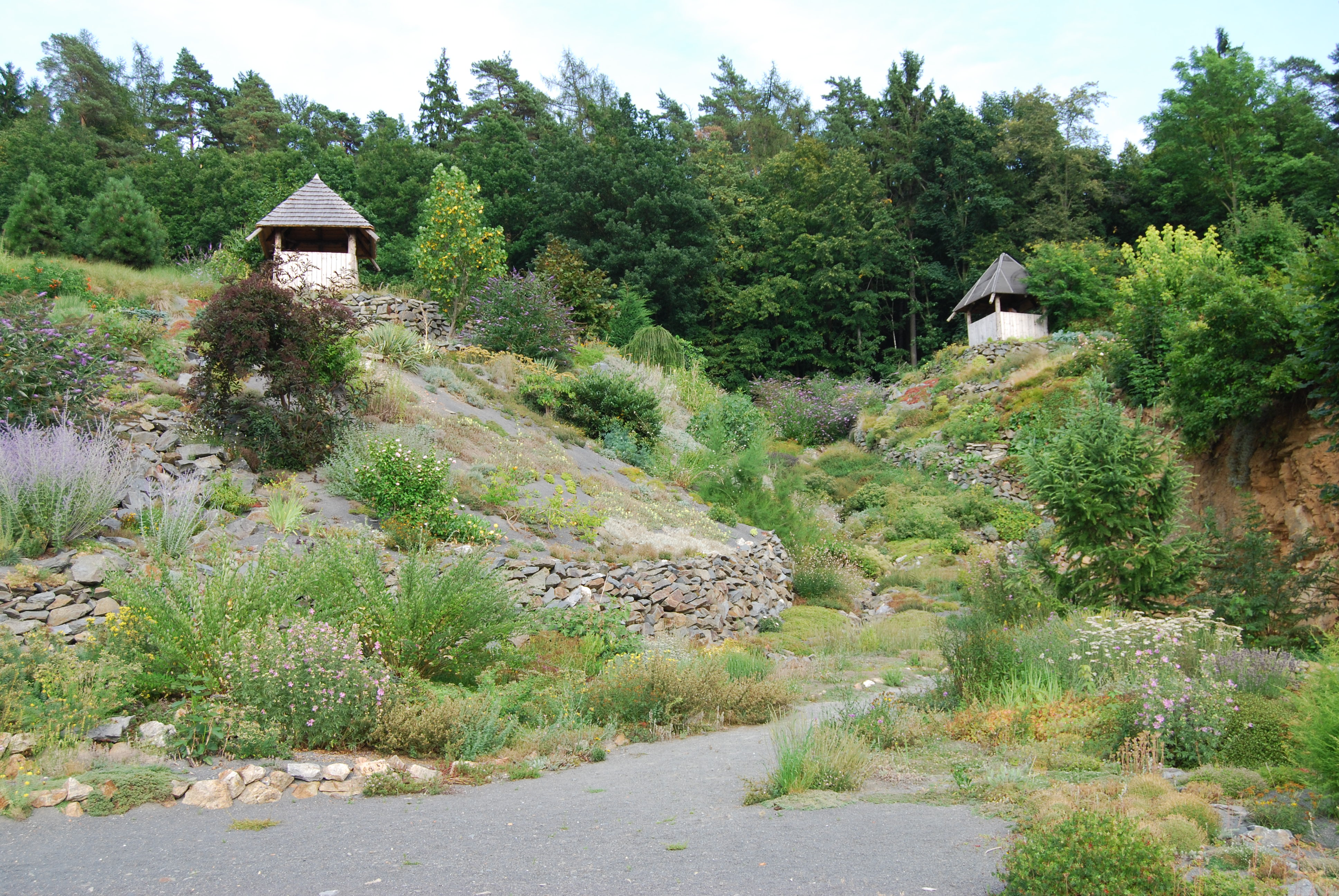 Arboretum cca 1 km za obcí Paseka směr Sovinec, po pravé straně před odbočkou na Karlov, na místě bývalé skládky. Paseka (okres Olomouc). Česká republika. Object location49° 49′ 01.97″ N, 17° 13′ 20.32″ E